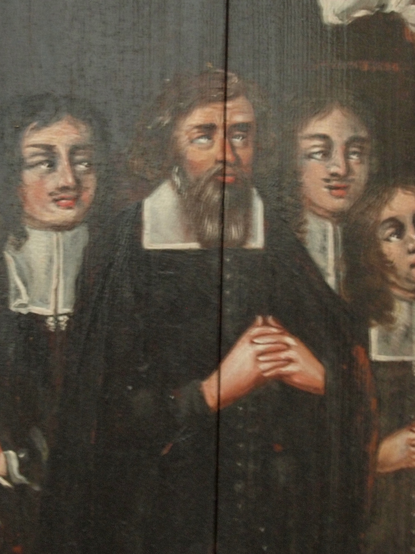 Detail Noarootsi pastori Isaac Svenonis Hasselblatti (1608-1682) epitaafilt Niguliste kirikus